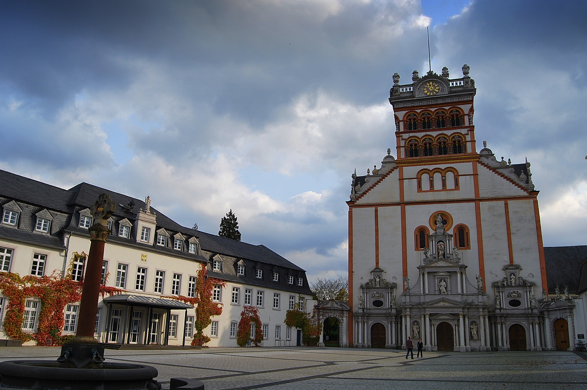 Trier, abdij Sint Matthias